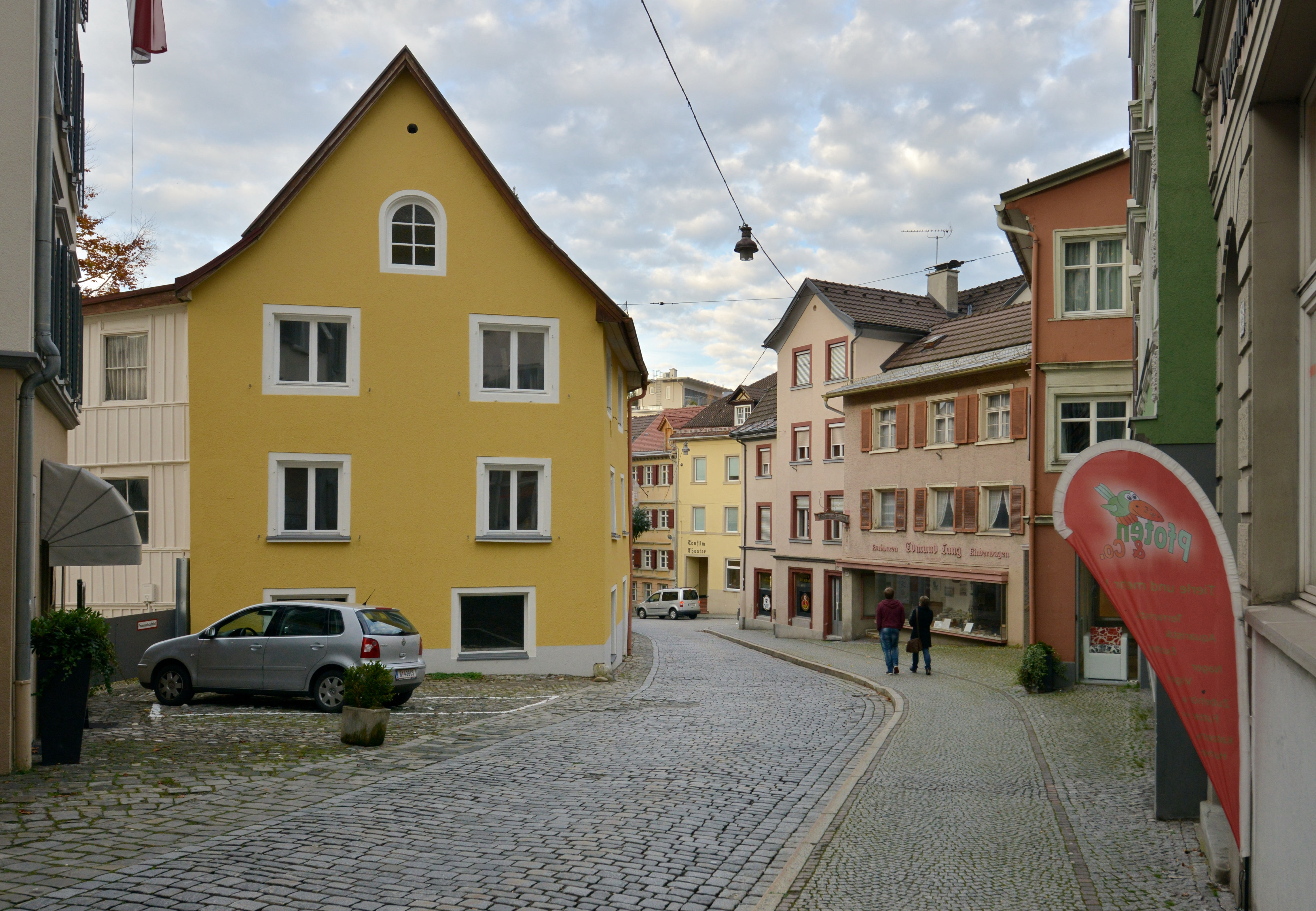 Bregenz, Kirch Straße 18